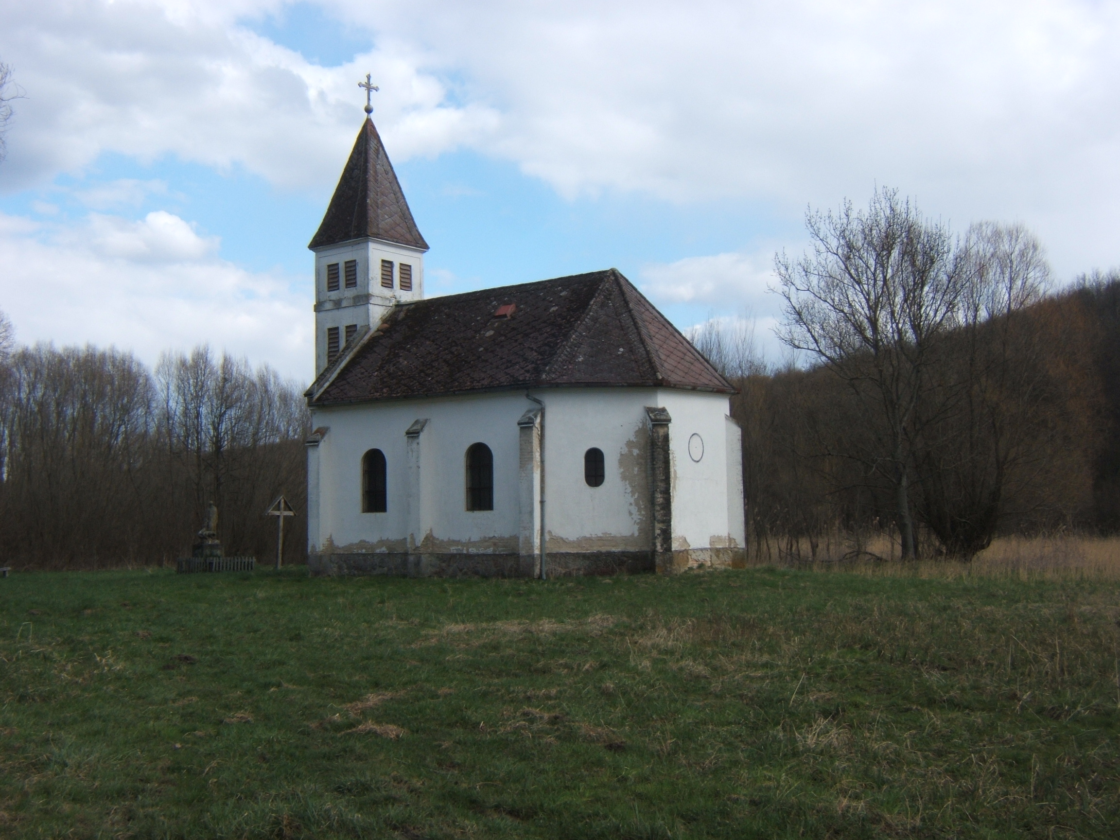 Mucsi, papdi kápolna